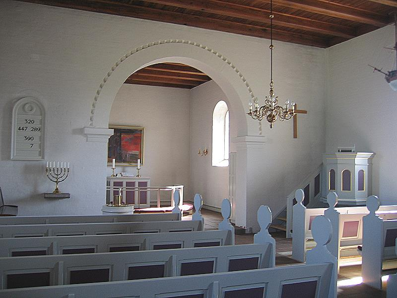 Jerup Kirke invendig